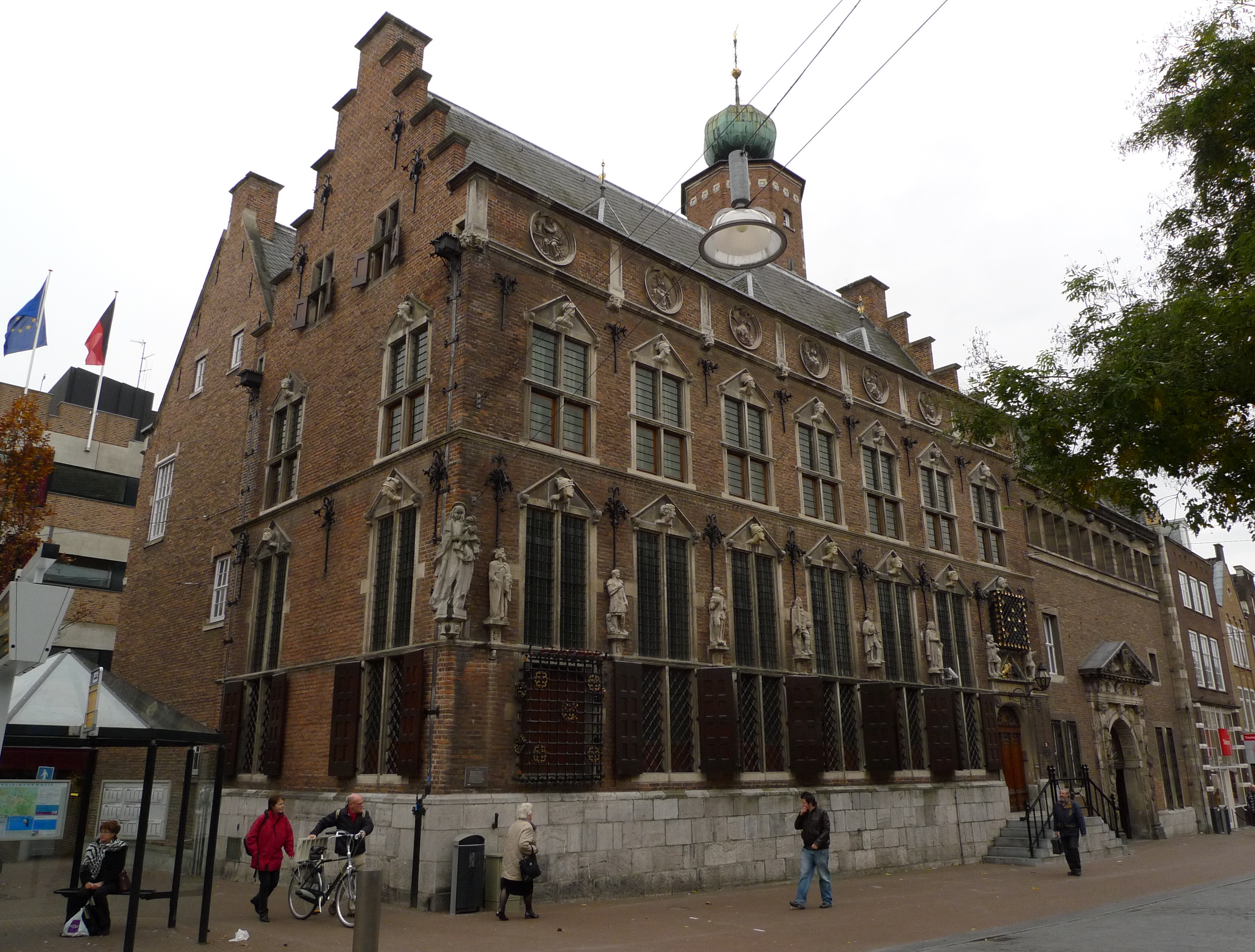 Stadhuis van Nijmegen, Burchtstraat 20. Nederlands rijksmonument nr. 31121